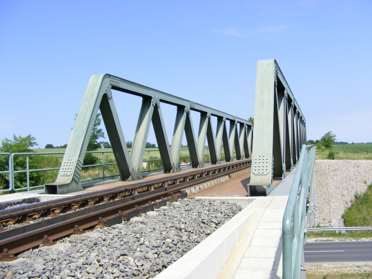 A 61-es elkerülő út felett átívelő vasúti híd